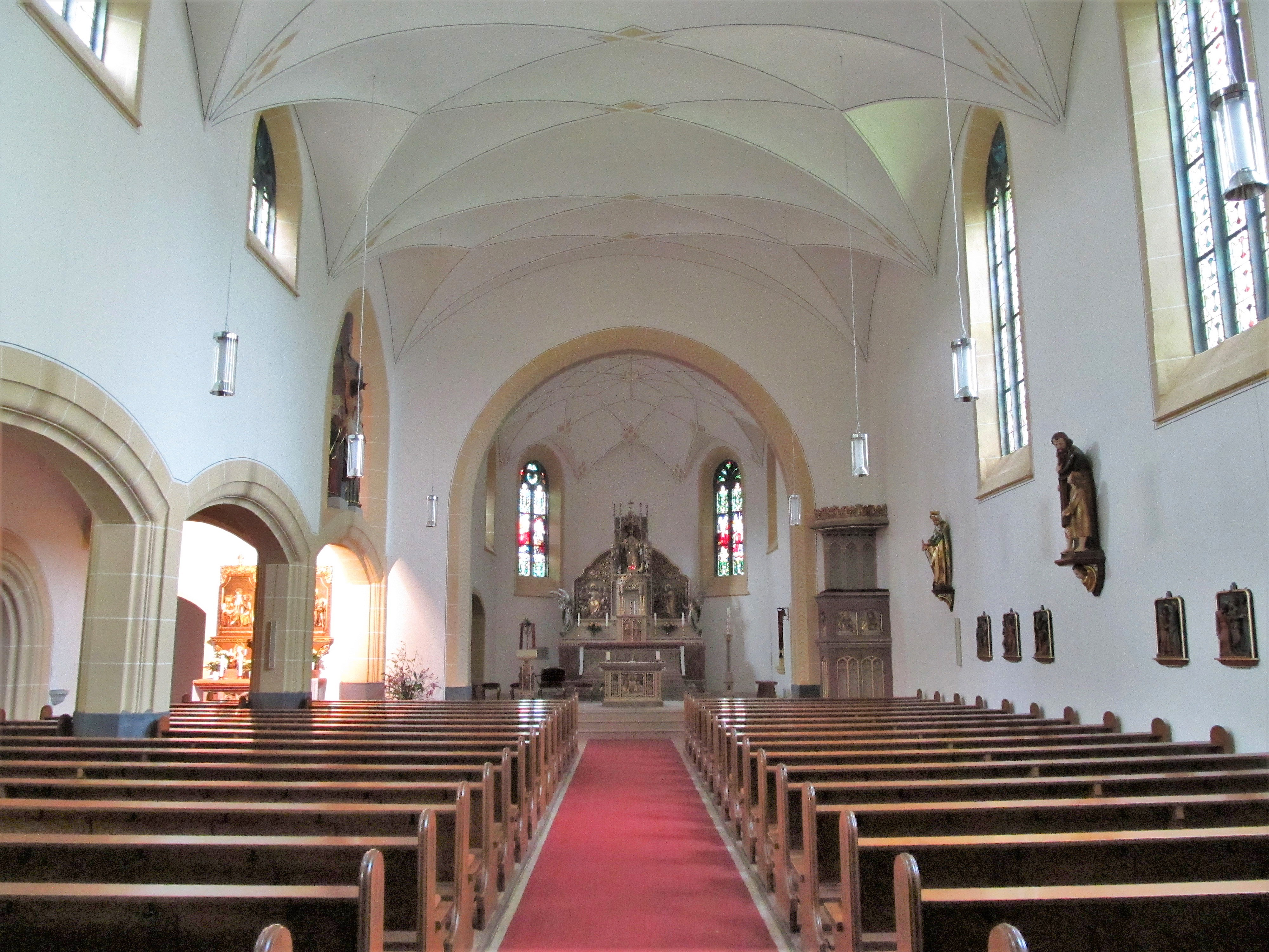 Blick ins Innere der katholischen Pfarrkirche St. Barbara in Stennweiler, einem Ortsteil der Gemeinde Schiffweiler, Landkreis Neunkirchen, Saarland